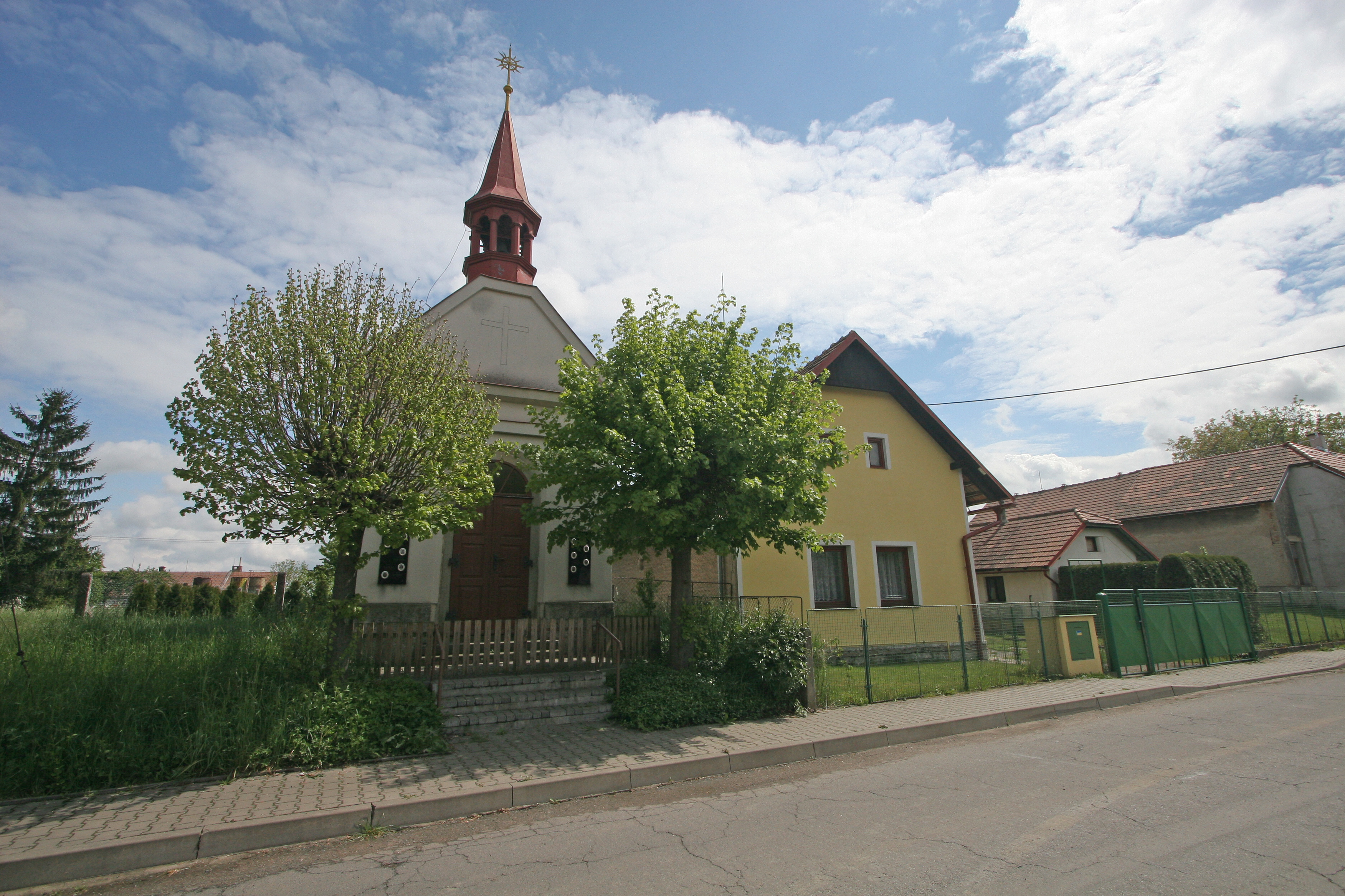 Dolní Bezděkov kaple